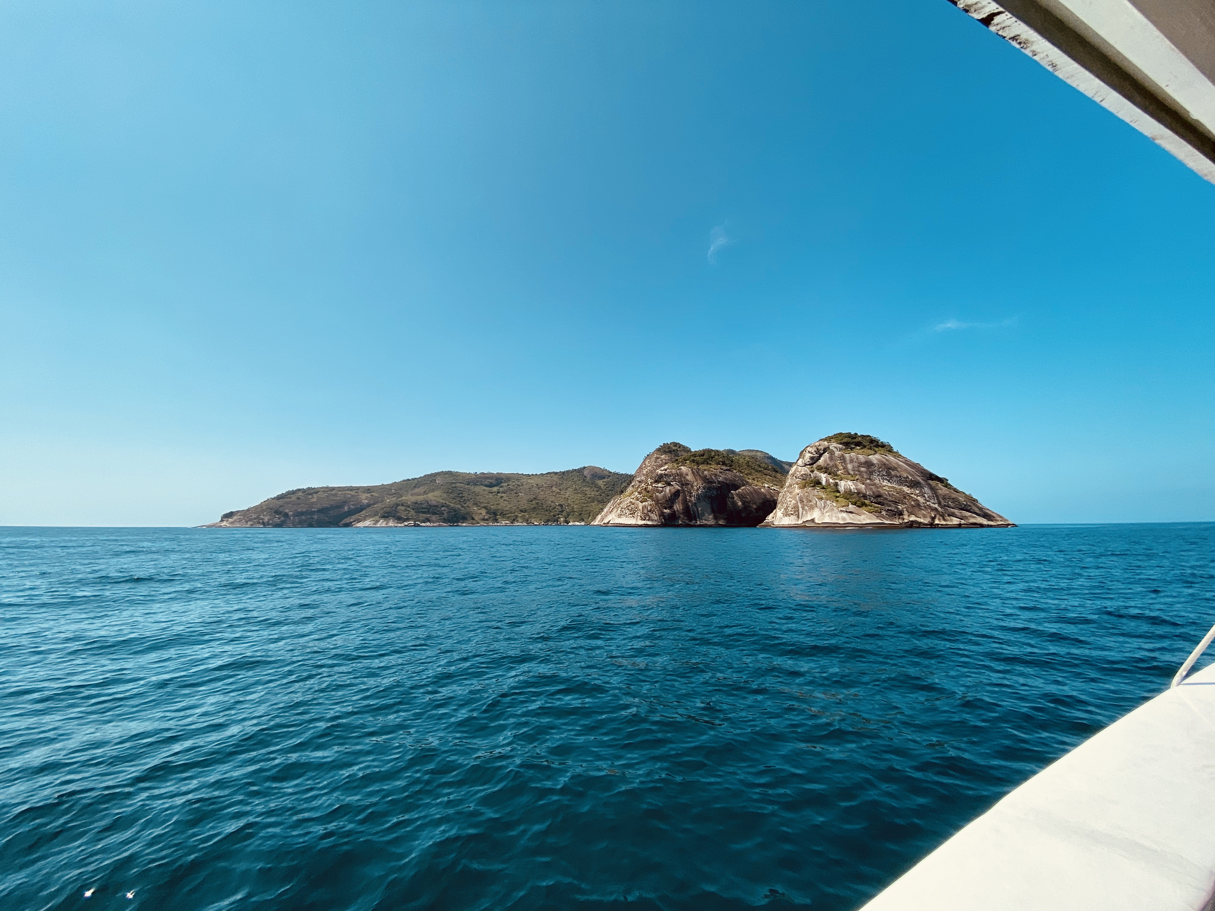 A maior iIlha do arquipelago de Alcatrazes, em 30 de Novembro de 2019, vista ao se aproximar de barco.